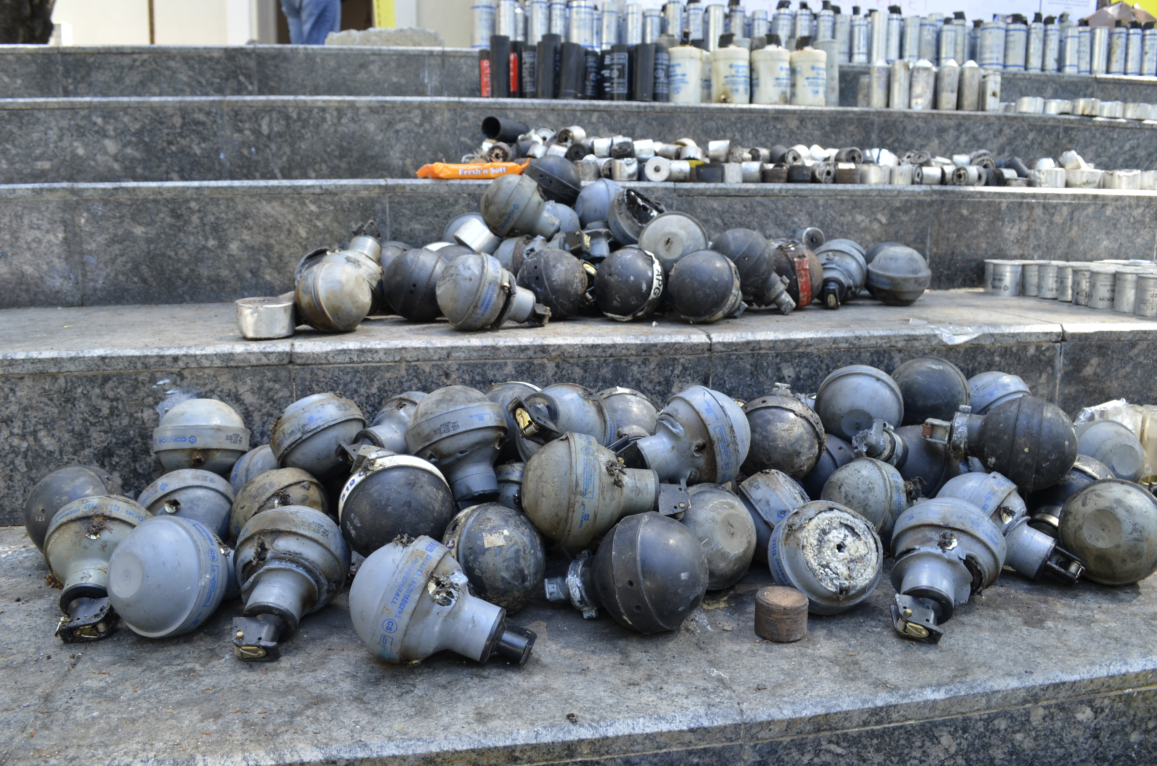 Marcha en Caracas, 20Abr14